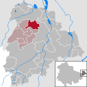 Rositz in Thuringia - District Altenburger Land